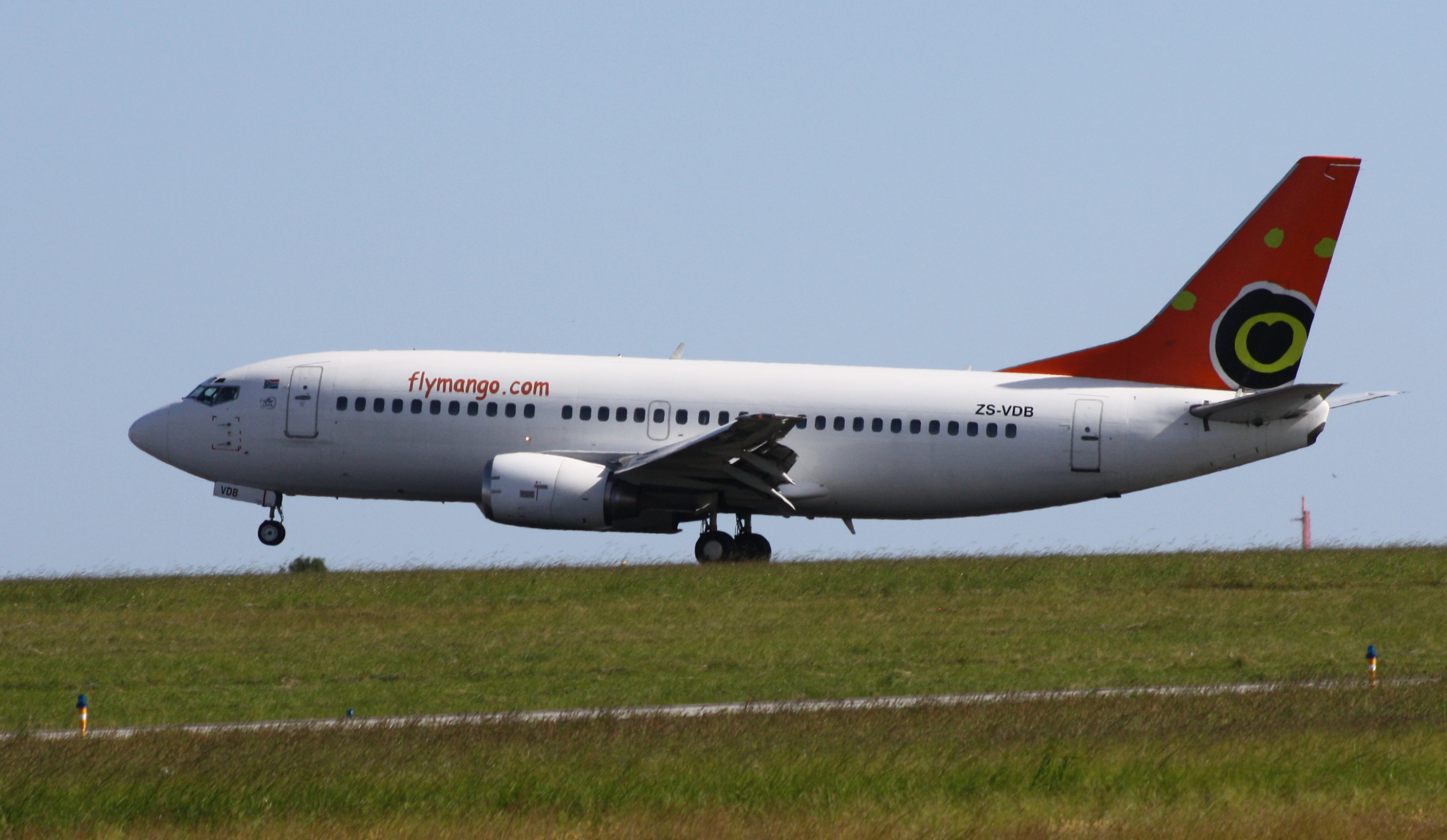 Mango B737-31L ZS-VDB